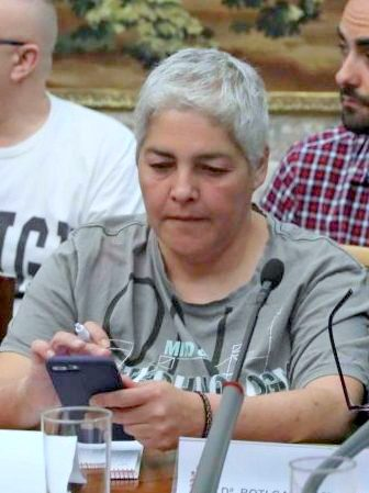 El delegado de Salud, Seguridad y Emergencias del Ayuntamiento de Madrid, Javier Barbero, se ha reunido esta mañana, lunes 2 de julio, con el delegado del Gobierno, José Manuel Rodríguez Uribes, en la Delegación de Gobierno de Madrid para preparar el dispositivo de seguridad adicional que se desplegará el próximo sábado 7 de julio con motivo de la manifestación del Orgullo 2018.